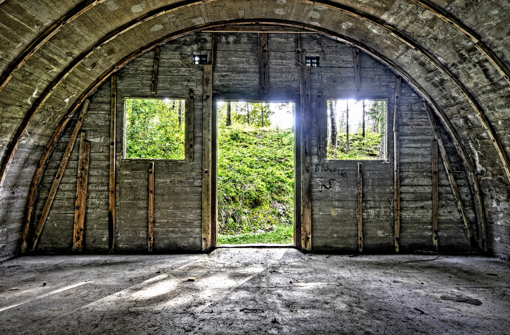 Innvendig bilde av et moniermagasin ved Sundås batteri i Stokke kommune